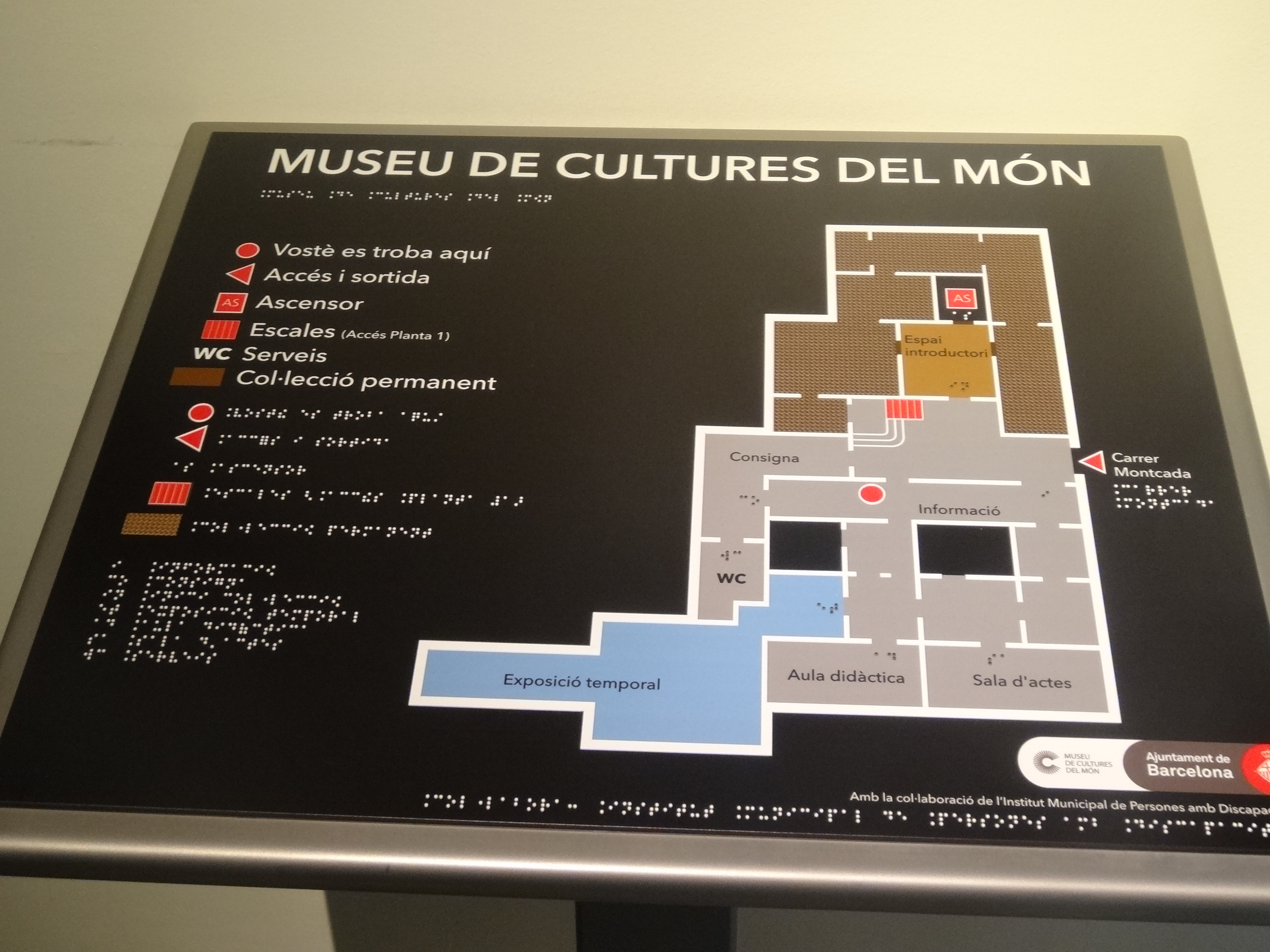 Plànol de la planta baixa del Museu de Cultures del Món